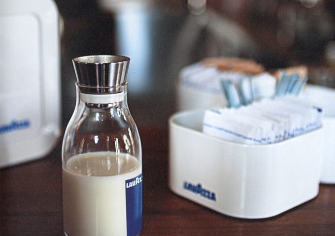 HORECA